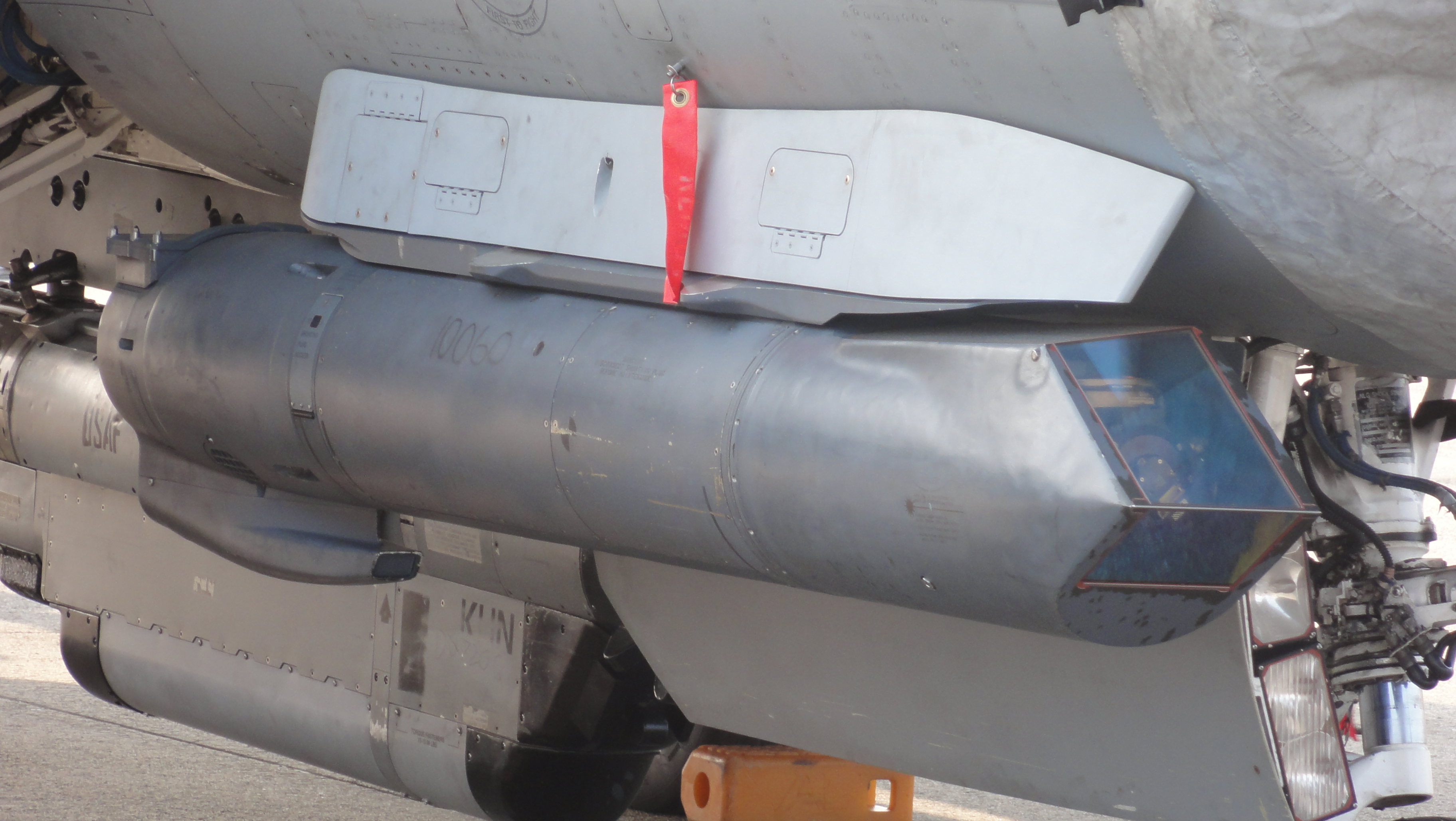 AN/AAQ-33 Sniper XRターゲティングポッド、2012年5月5日岩国基地にて。